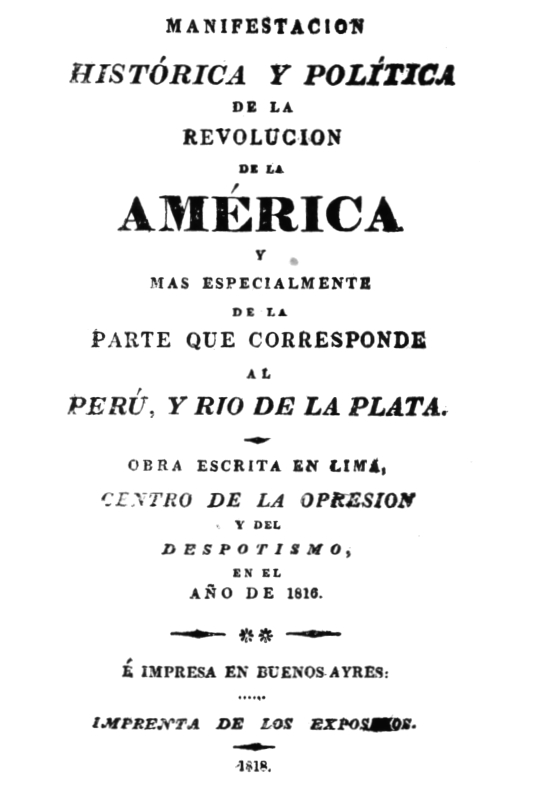 Portada de la "Manifestación histórica y política de la revolución de América", escrito por José de la Riva Agüero y Sánchez Boquete. Escrito en 1816 y publicado en Buenos Aires en 1818, contenía una lista de "28 causas" que justificaban la independencia de Hispanoamérica.